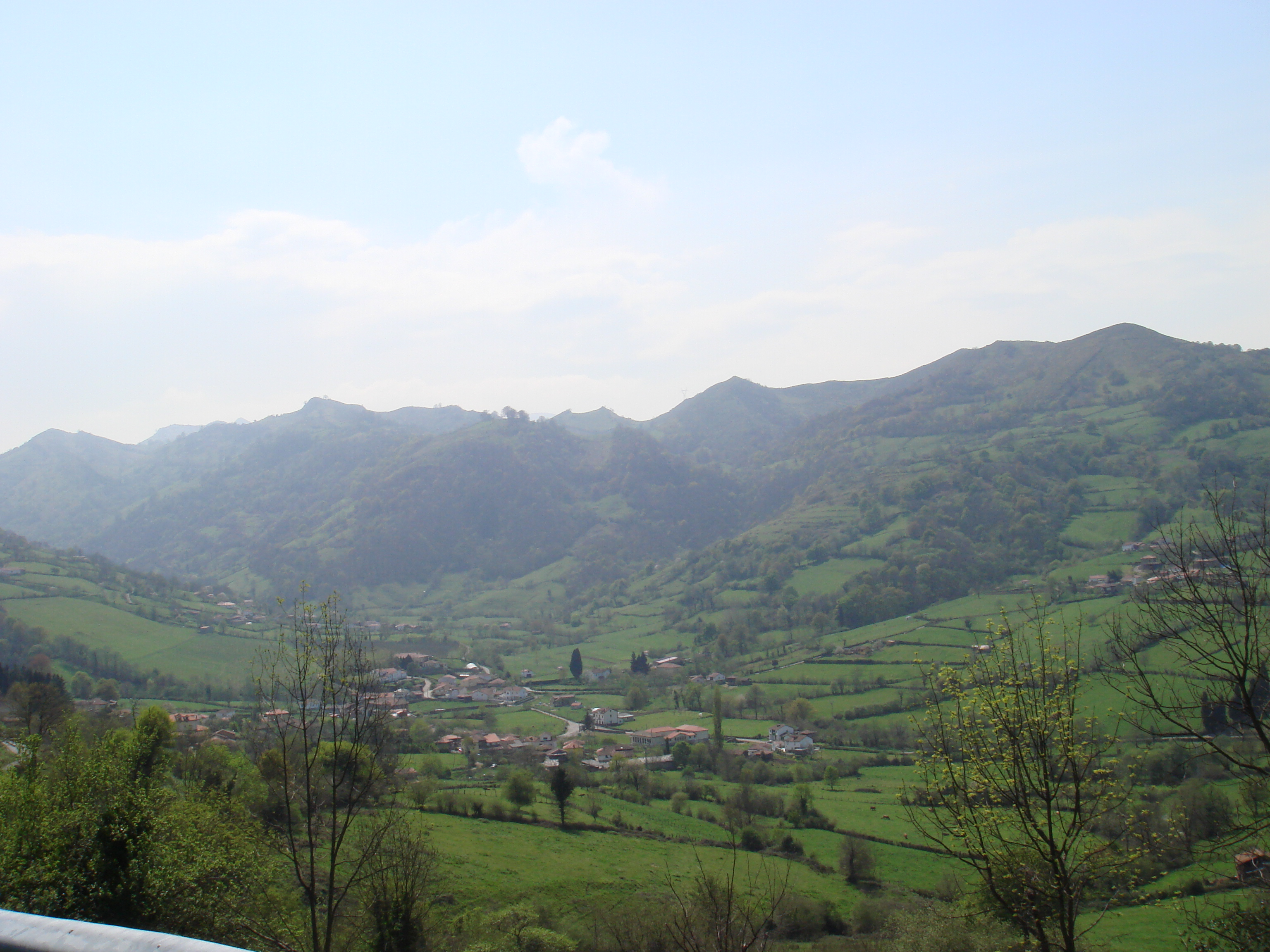 vista parcial de sama